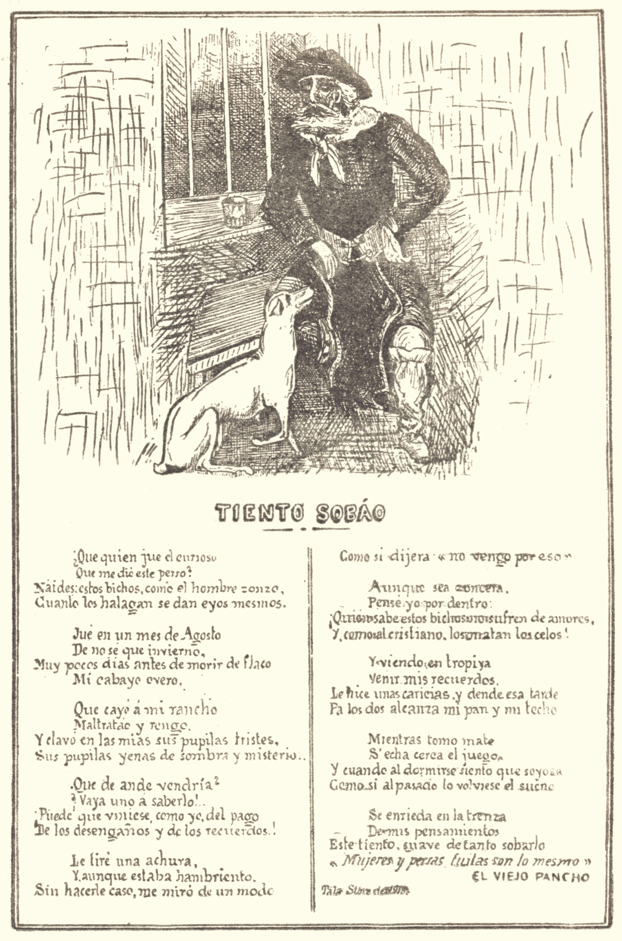 Manuscrito original de "Tiento sobáo" del escritor uruguayo José Alonso y Trelles (1857 - 1924).